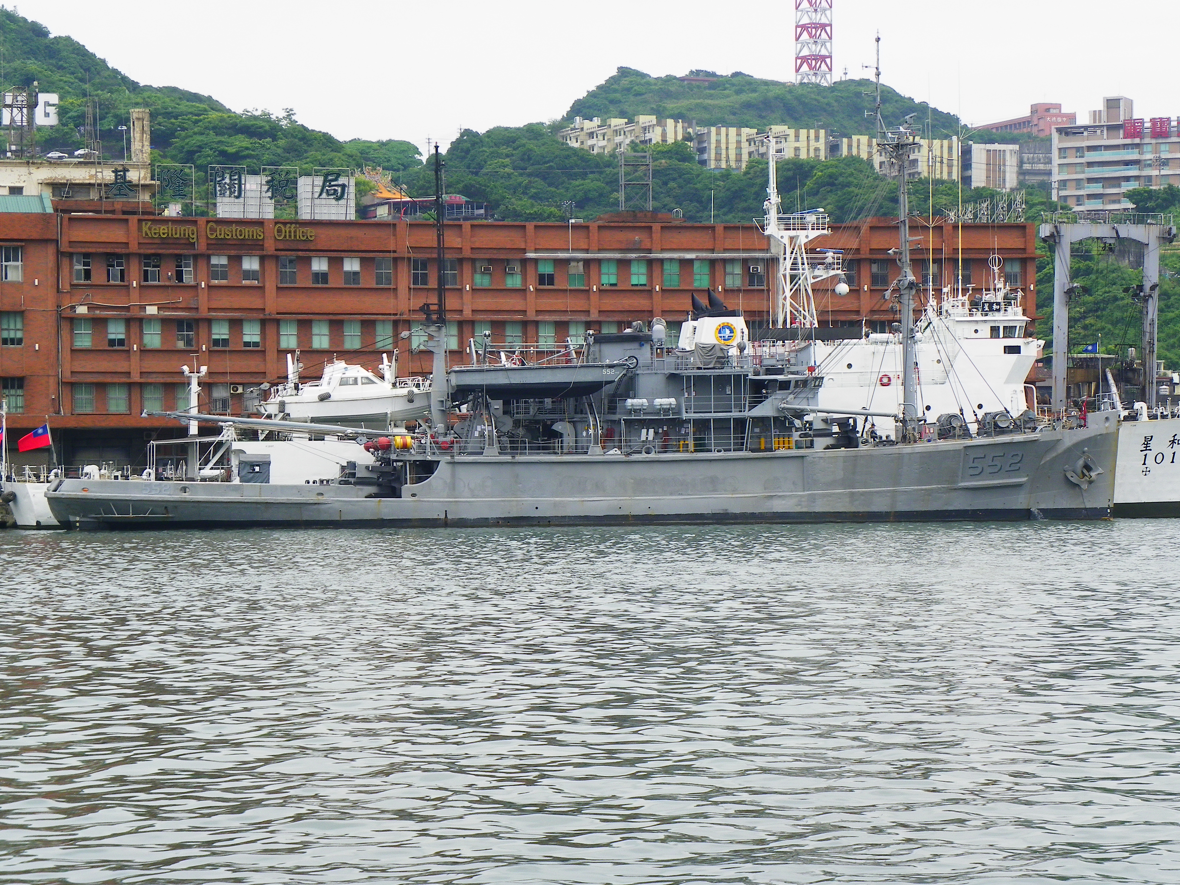 中華民國海軍救難艦大湖號（ARS-552），美國海軍潛水伕（Diver）級救難艦Grapple（ARS-7）的後身，1978年購入。與後方的行政院海岸巡防署海洋巡防總局巡防艦和星（CG-101）並泊於基隆關稅局前。